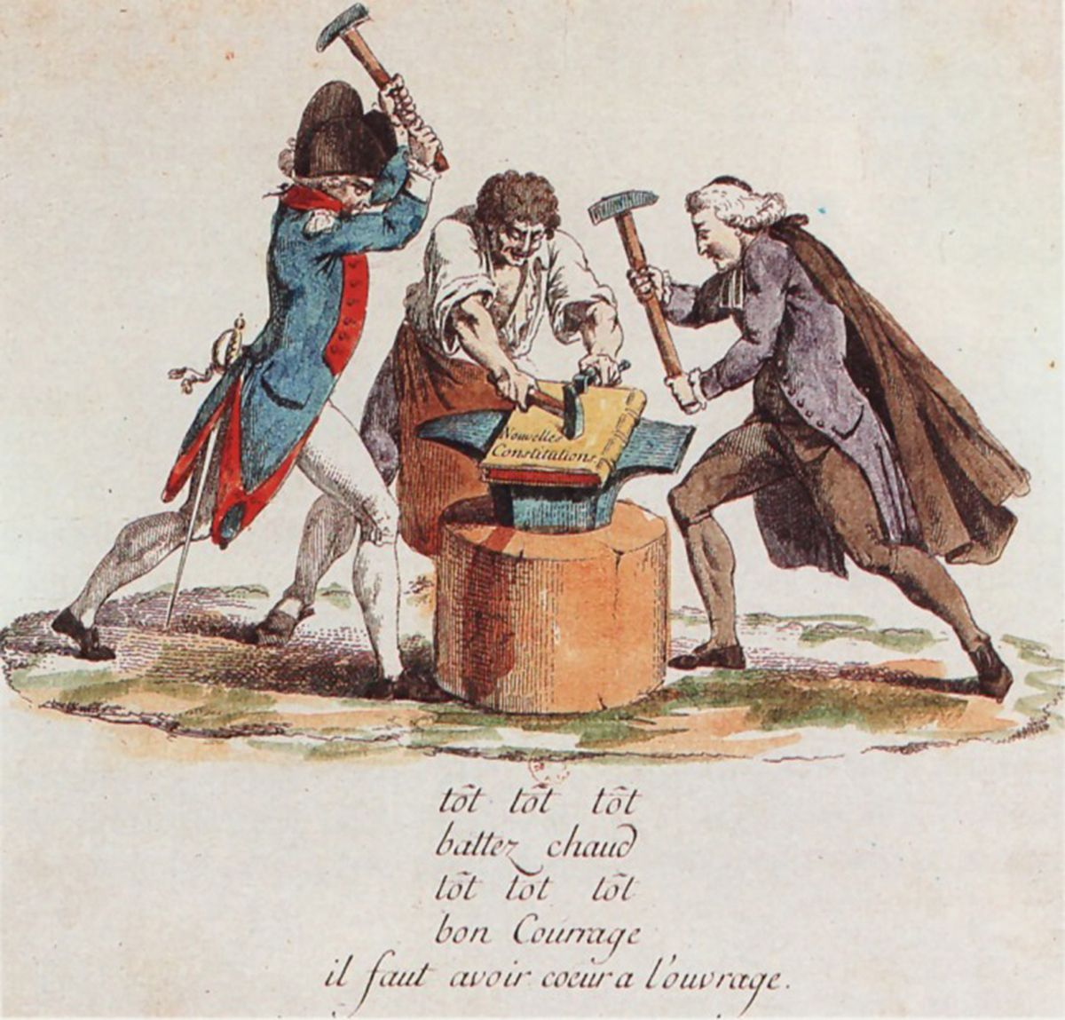 De tre stendene i Frankrike smir grunnloven av 1791.